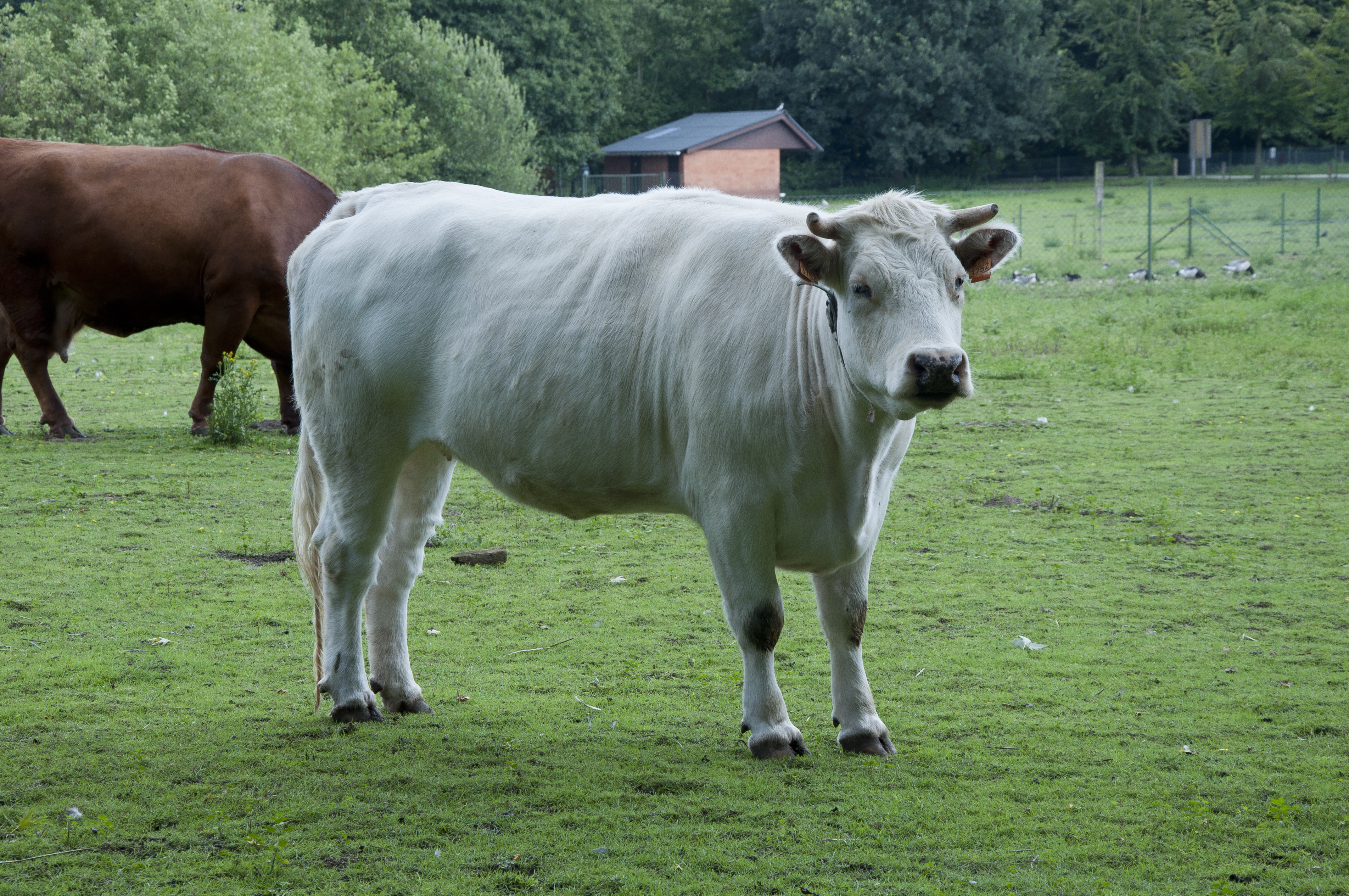 Belgisch Witblauw rund in domein Puyenbroek, Wachtebeke, België